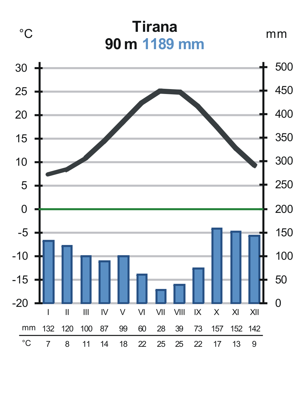 Tirana kliimadiagramm климатическая диаграмма Тираны (Албания) Diagramme climatique Tirana